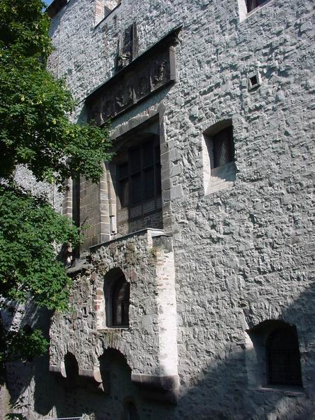 Halle Moritzburg, eigenes Foto von 2004, public domain, Mewes 20:44, 17. Okt 2005 (CEST) Altes Burgtor an der Nordseite.